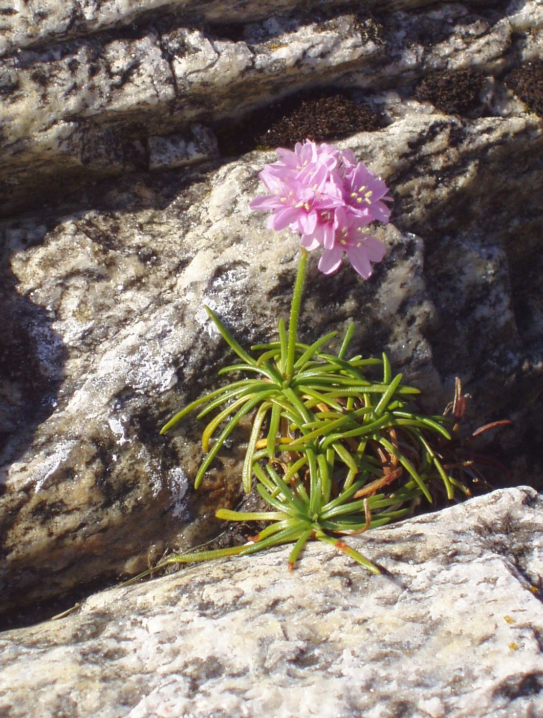 Fjørekoll på Helgeland